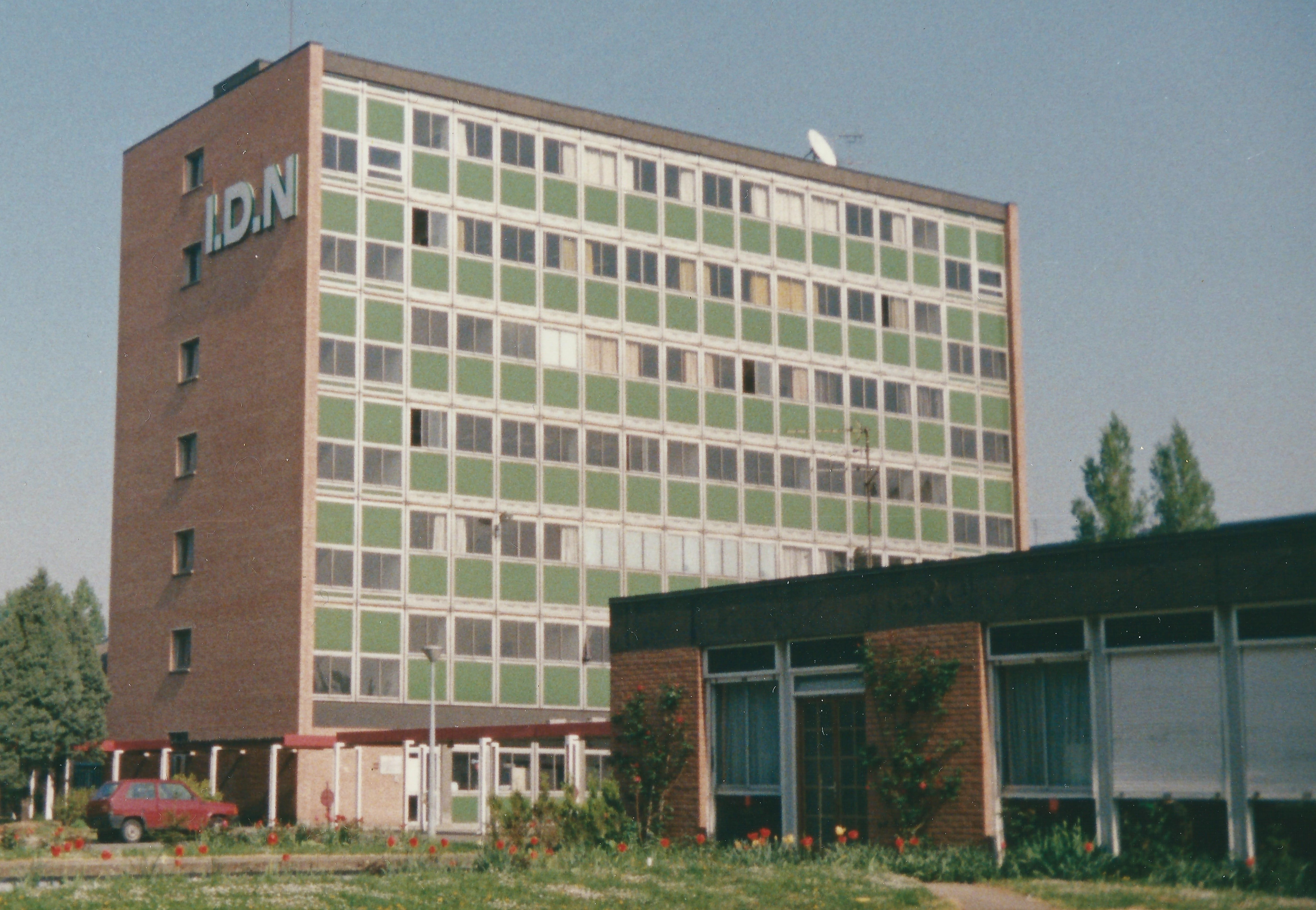 L'école en 1991